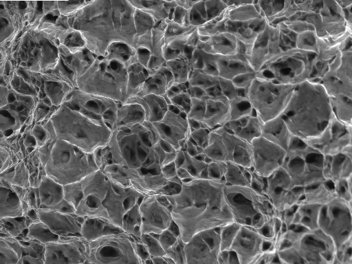 Duktiler Gewaltbruch